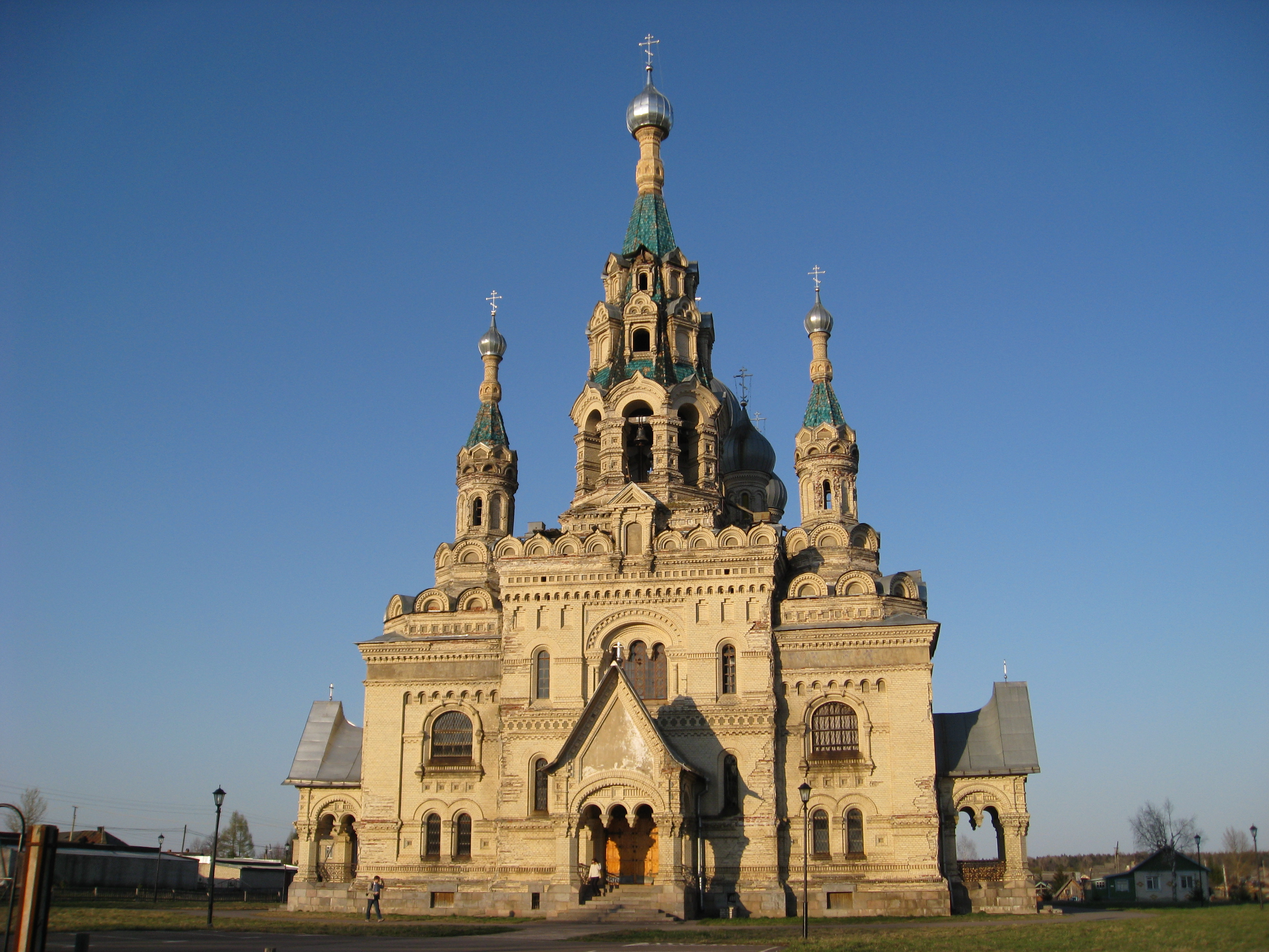 Ярославская область, Первомайский район, с. Кукобой Храм Спаса Нерукотворного Образа